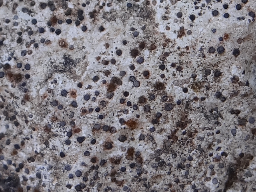 Sarcogyne regularis (location: Poland, Wyżyna Krakowsko-Częstochowska, Dolina Kobylańska)